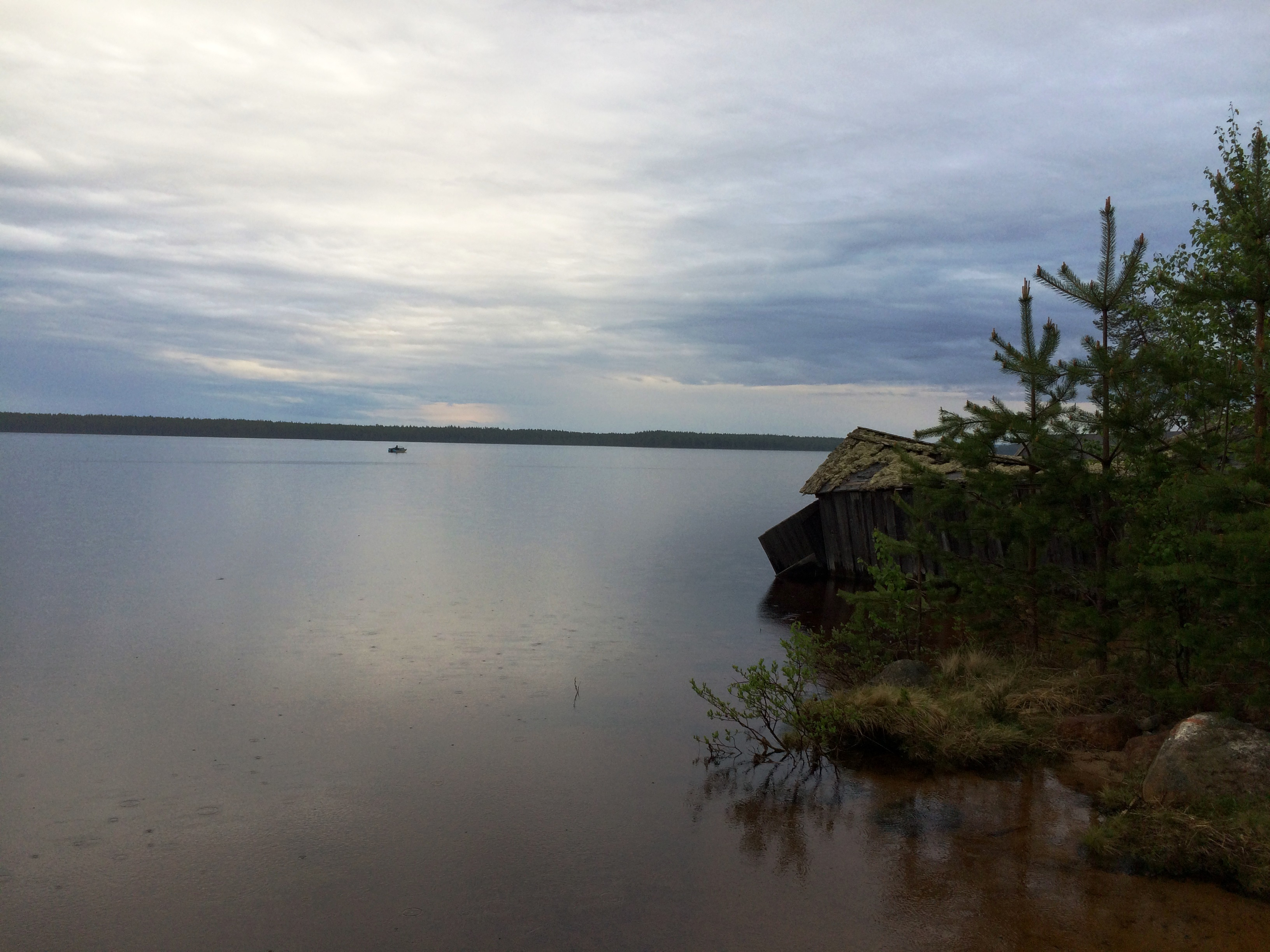 Кимоваара